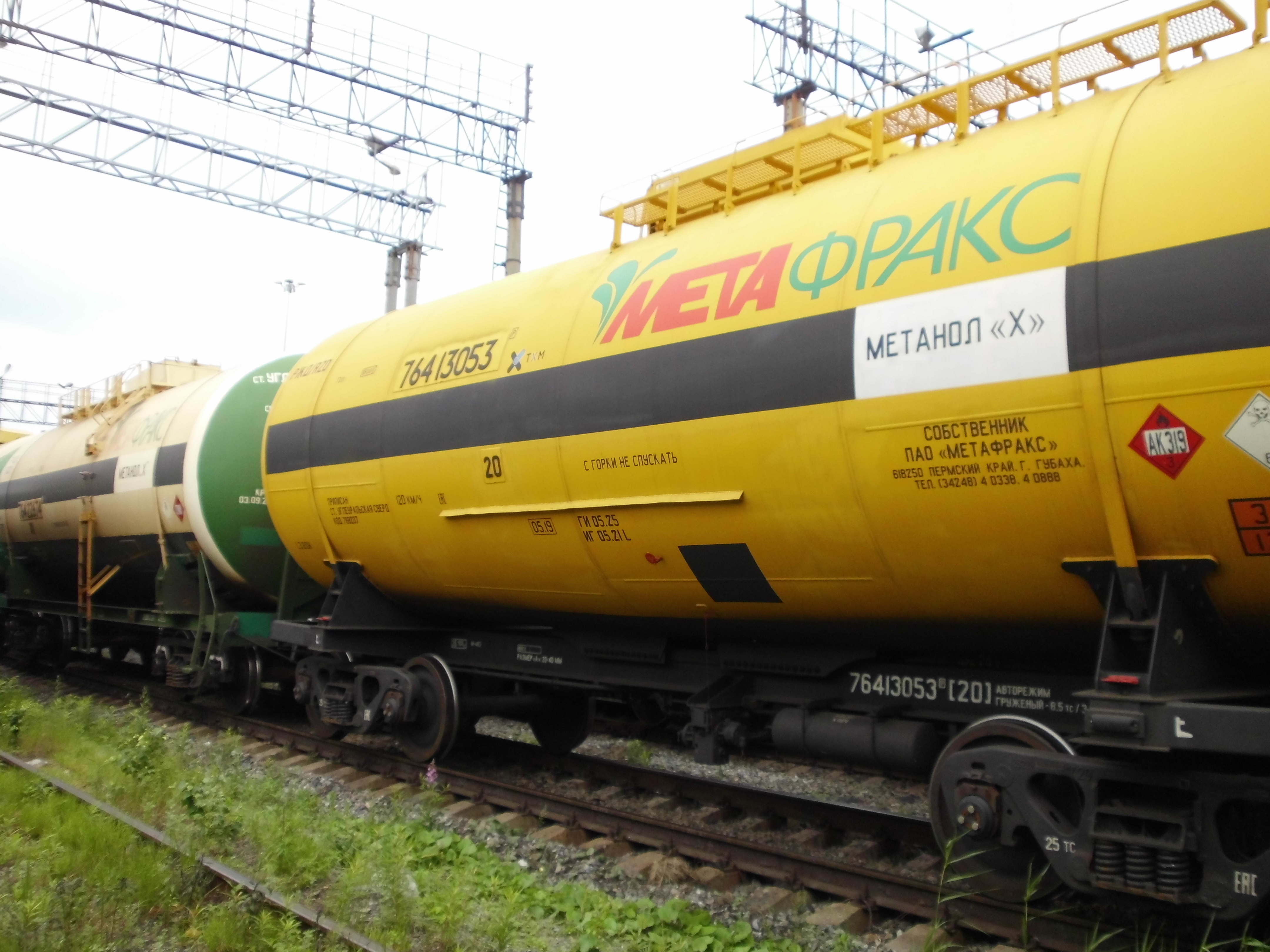 4-х осные вагоны-цистерны с бронелистом для метанола. Россия.